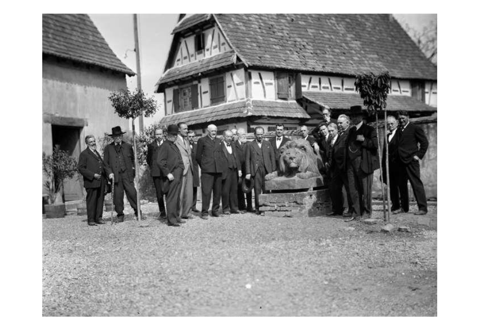 les amis artistes d'Alfred Marzolff autour du lion (déplacé à Haguenau) au domicle du sculpteur à Rountzenheim photographié par Lucien Blumer